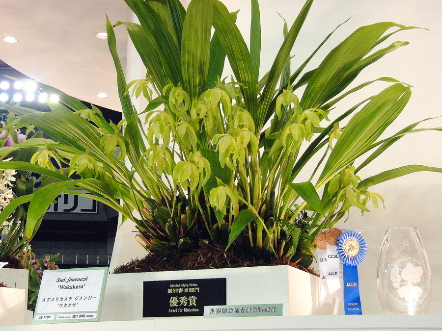 JGP2012【部門1】優秀賞・WOC特別賞 Sud. jimenezii 'Wakakusa' 2012/02/18東京ドームにて撮影